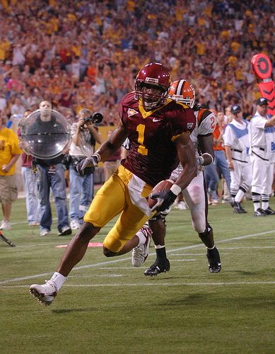 Minnesota v Bowling Green